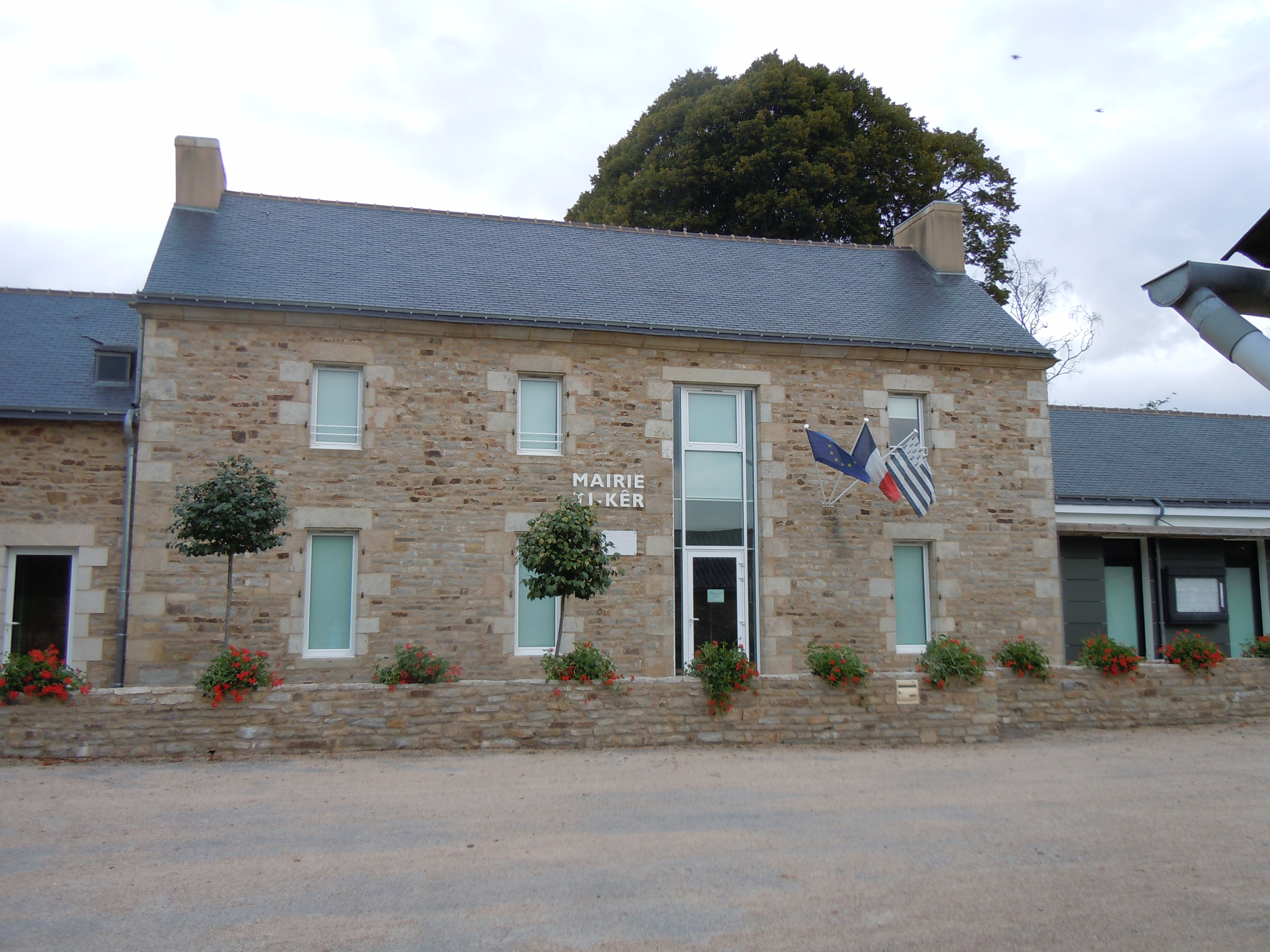 mairie de Mellac, commune du département du Finistère, France